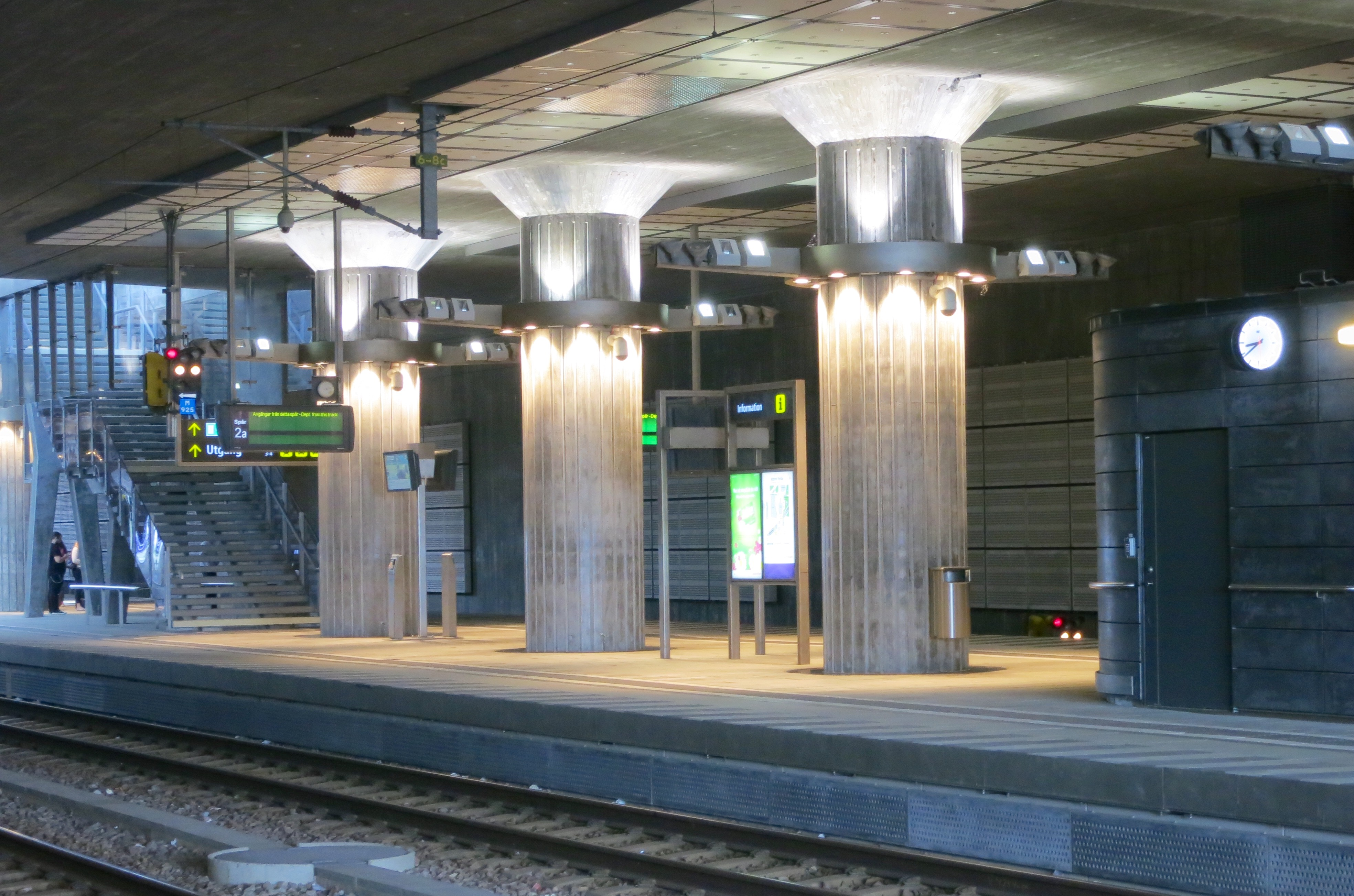 Hyllie station, spår 2